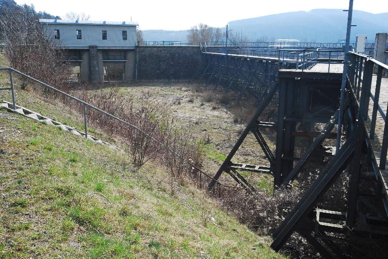 Das Verteilungsbauwerk und die Rechenanlage des Retentionsbeckens Auhof in Wien